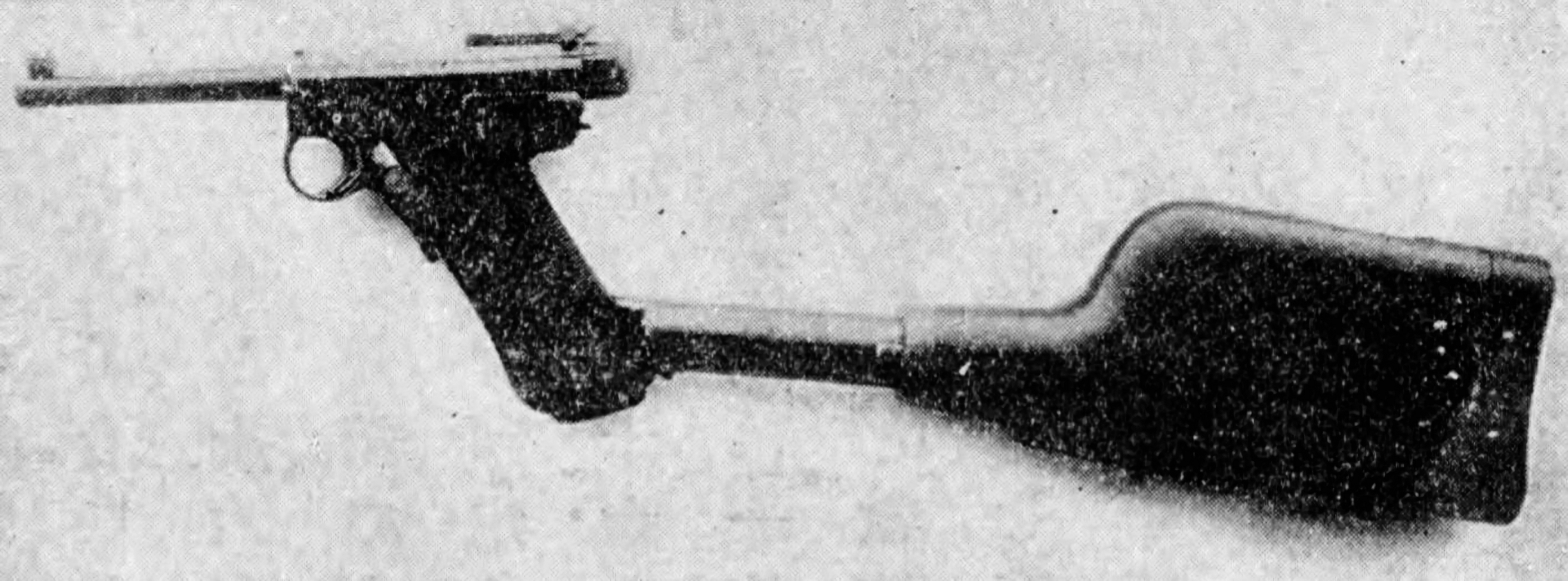 取り外し式銃床を装着した南部式大型拳銃甲號。